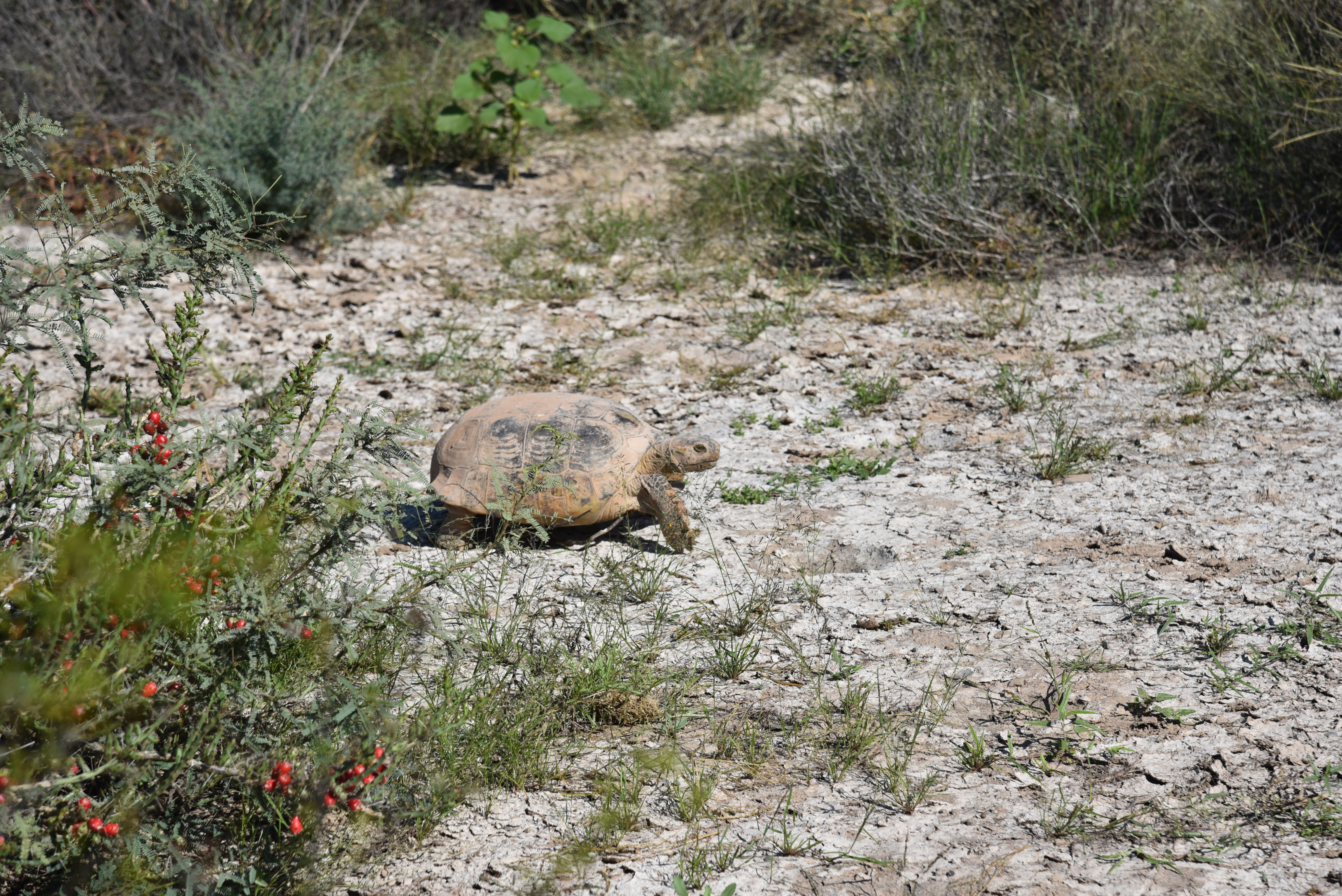 Especie endémica y en peligro de extinción This is an image of the Biosphere Reserve: Mapimí